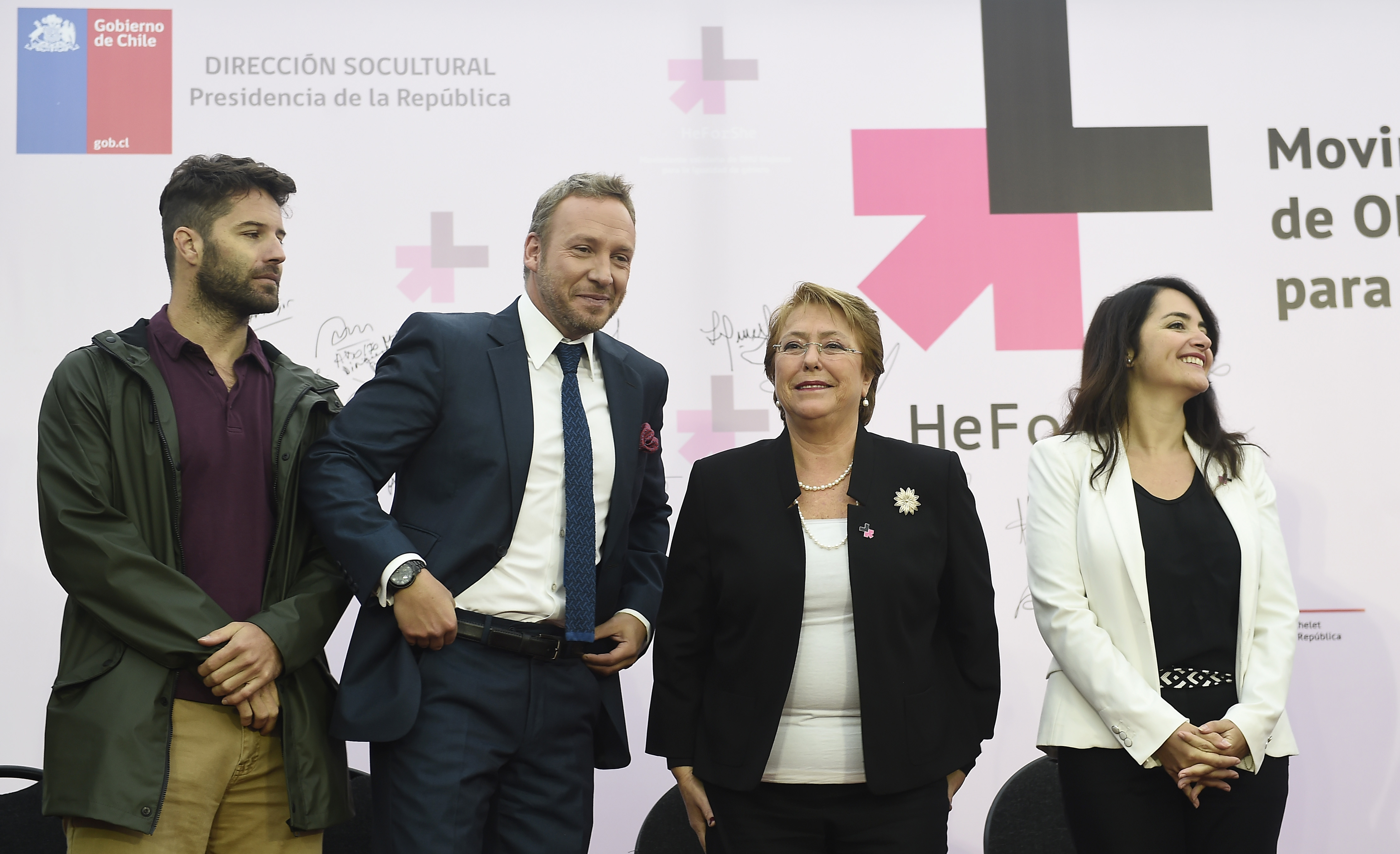 Gobierno de Chile